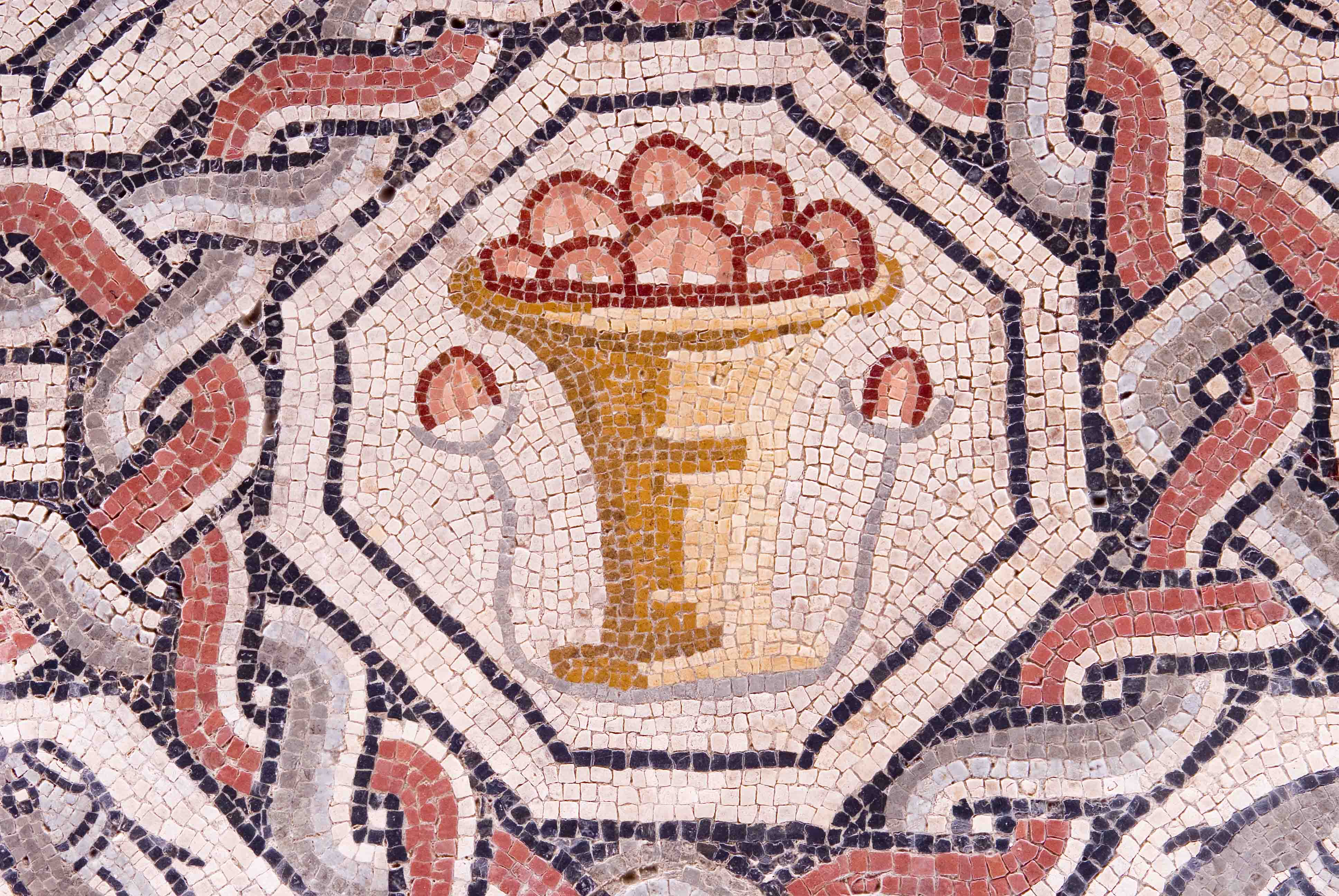 Detalle del mosaico de Los Peces, Villa Romana de Carranque